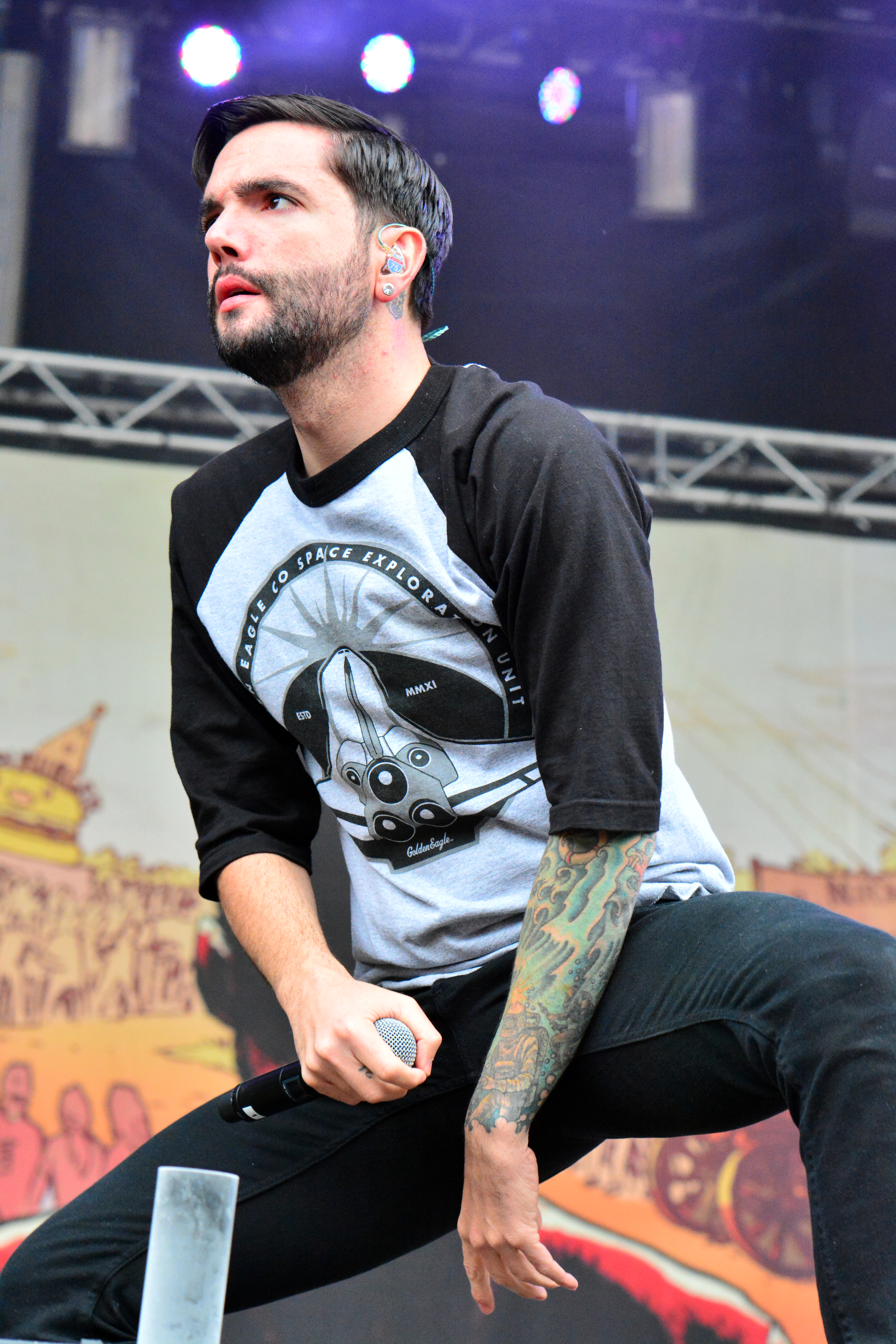 Jeremy McKinnon von A Day to Remember beim Elbriot 2014